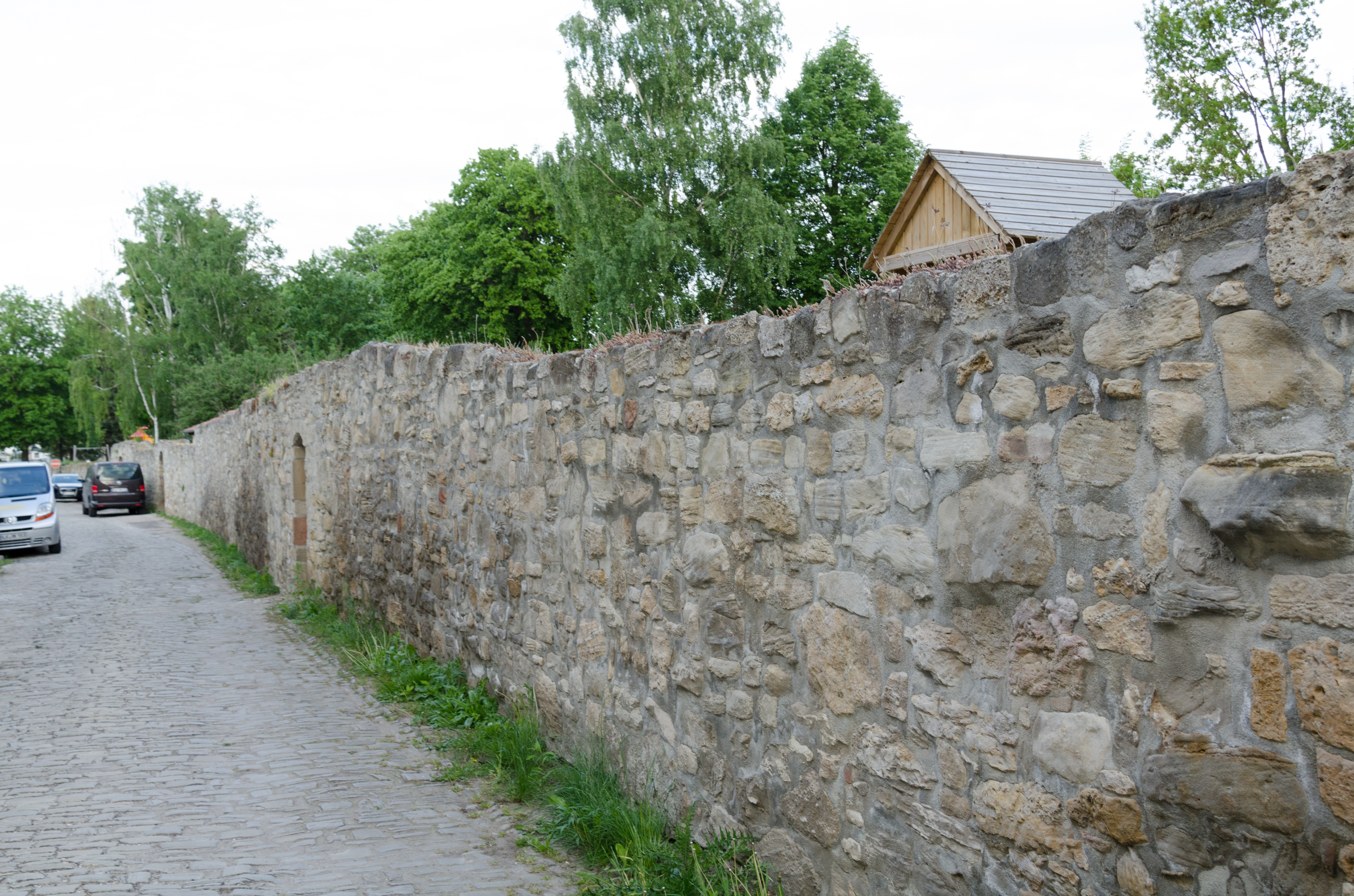 Laucha an der Unstrut, Stadtmauerabschnitt Untere Stadtmauer